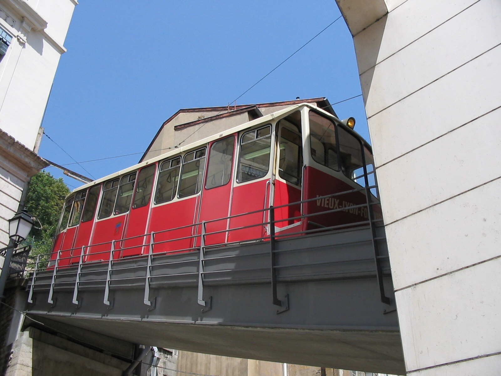 Funiculaire de Lyon (France) Funicular in Lyon (France)